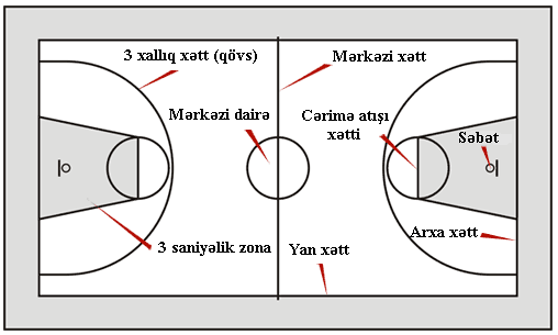 Basketbol meydançası